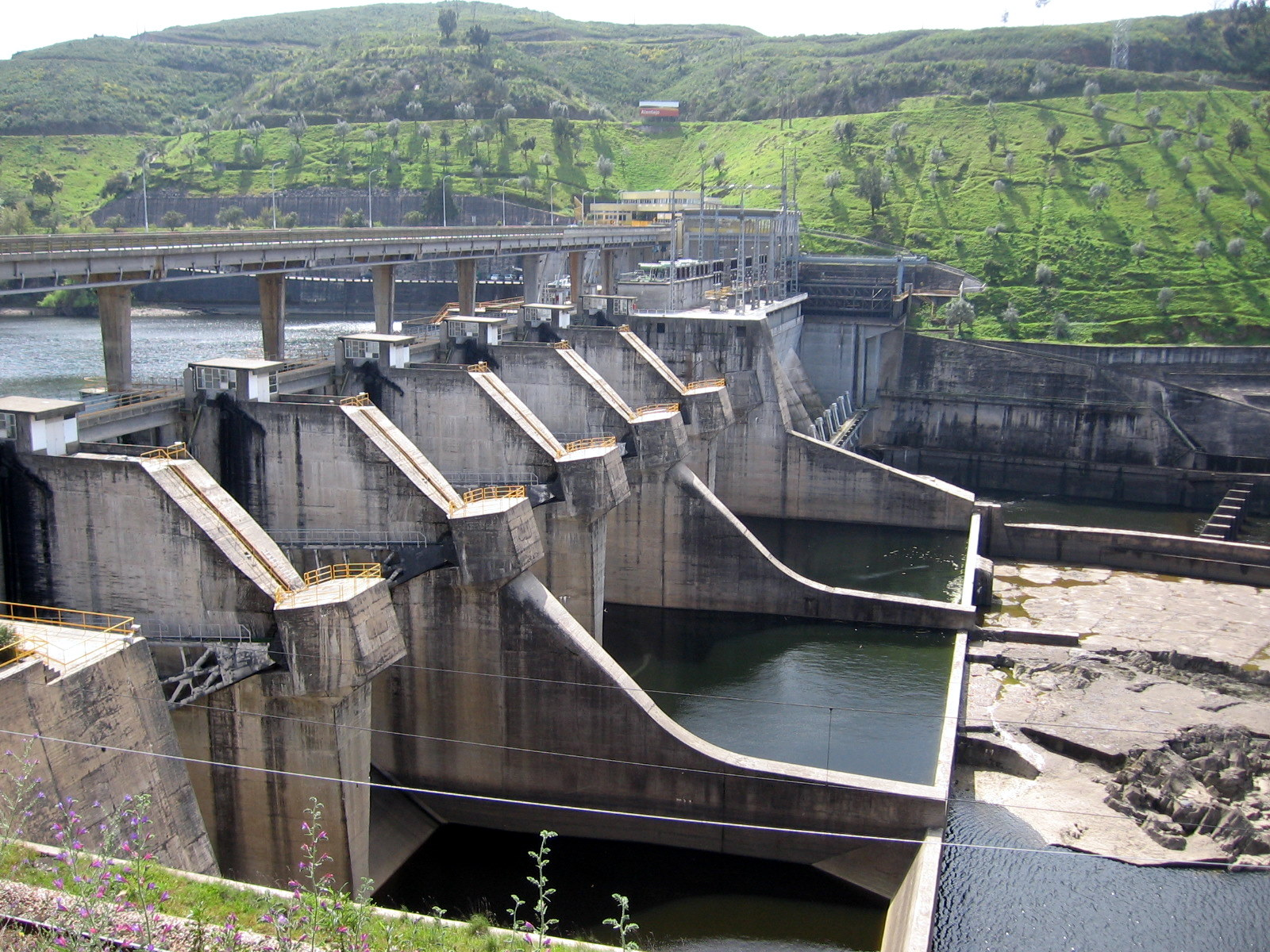 Ponte rodoviária sobre a barragem de Fratel, rio Tejo, Portugal